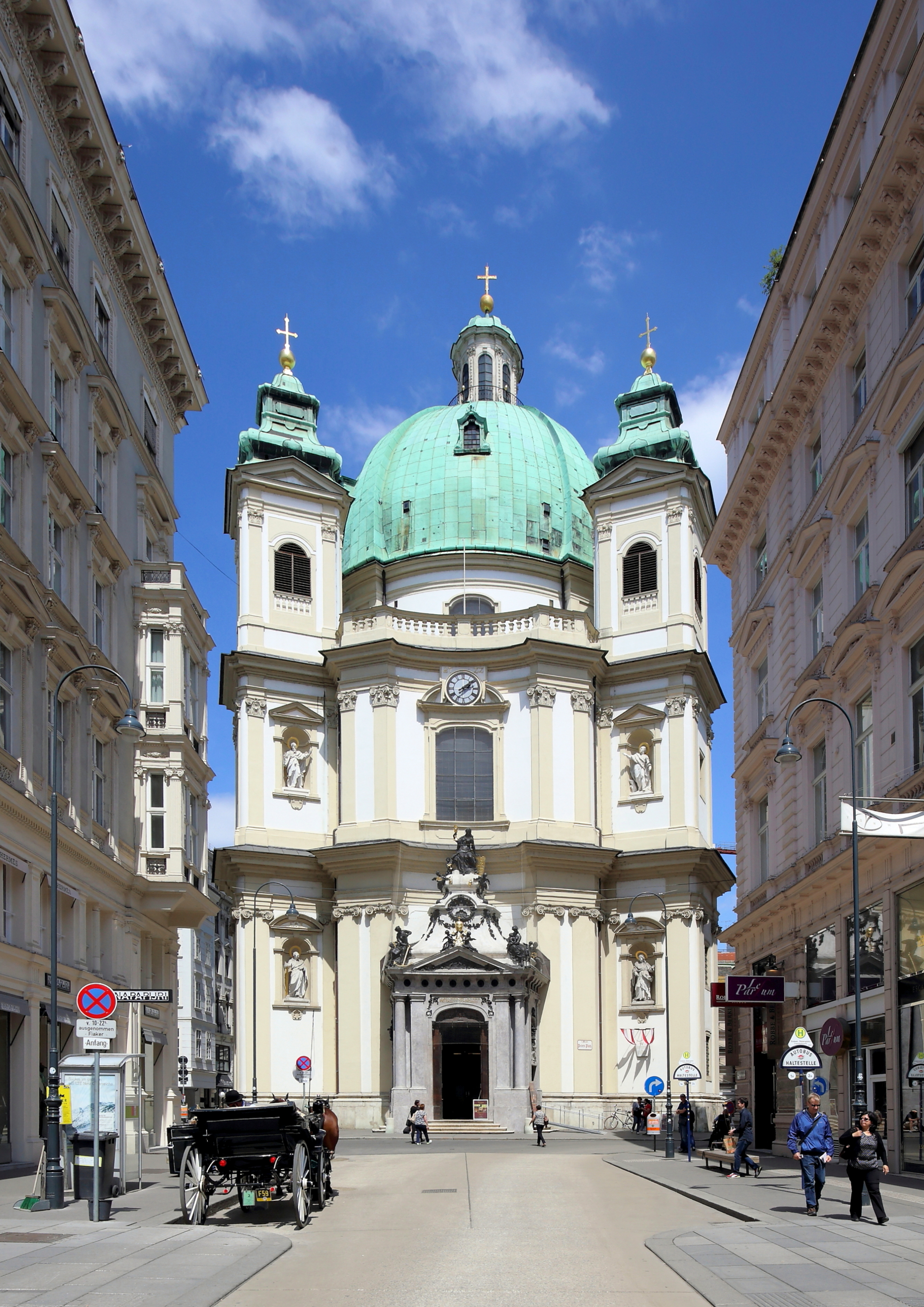 Hauptfassade bzw. Südwestansicht der Peterskirche im 1. Wiener Gemeindebezirk Innere Stadt. Der erste Kuppelbau des barocken Wien wurde ab 1701/02 errichtet. Die Planung und der Baubeginn (Fundamente) erfolgte unter Gabriele Montani. Nachdem dieser als Festungsarchitekt nach Madrid zog, setzte ab 1703 sehr wahrscheinlich Johann Lucas von Hildebrandt den Bau nach veränderten Plänen fort.